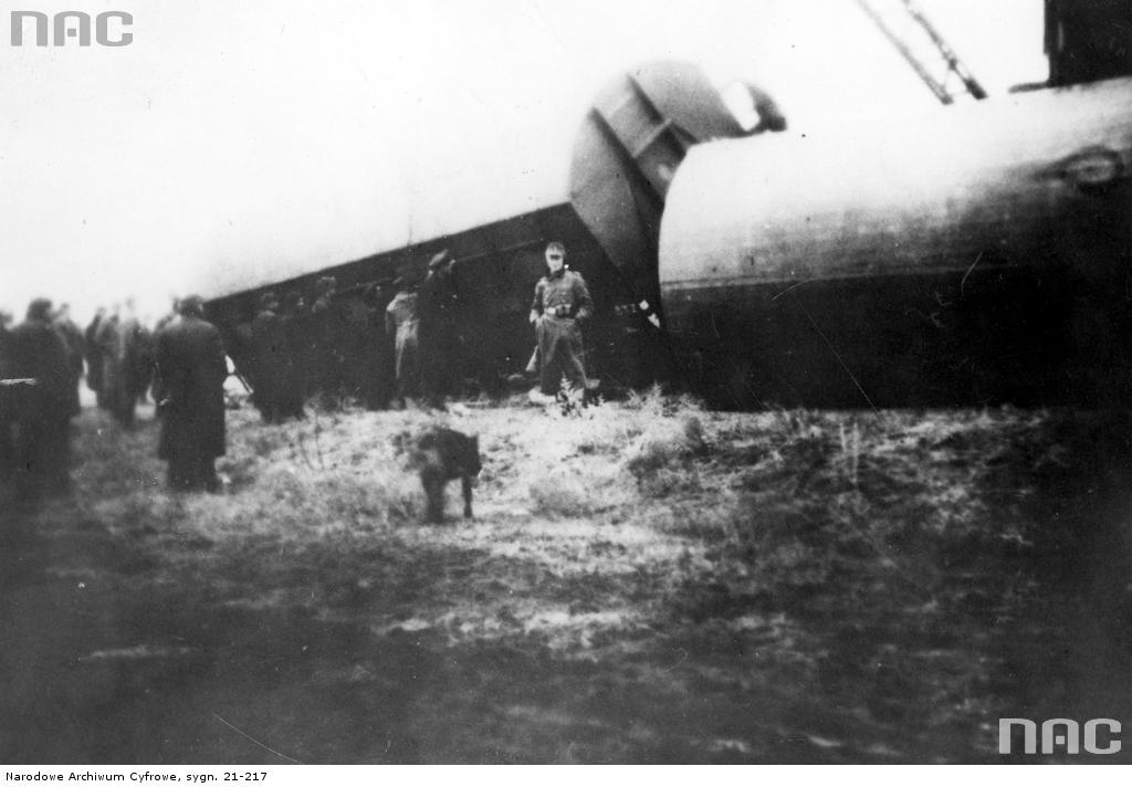 Żołnierze niemieccy przy wykolejonym pociągu.